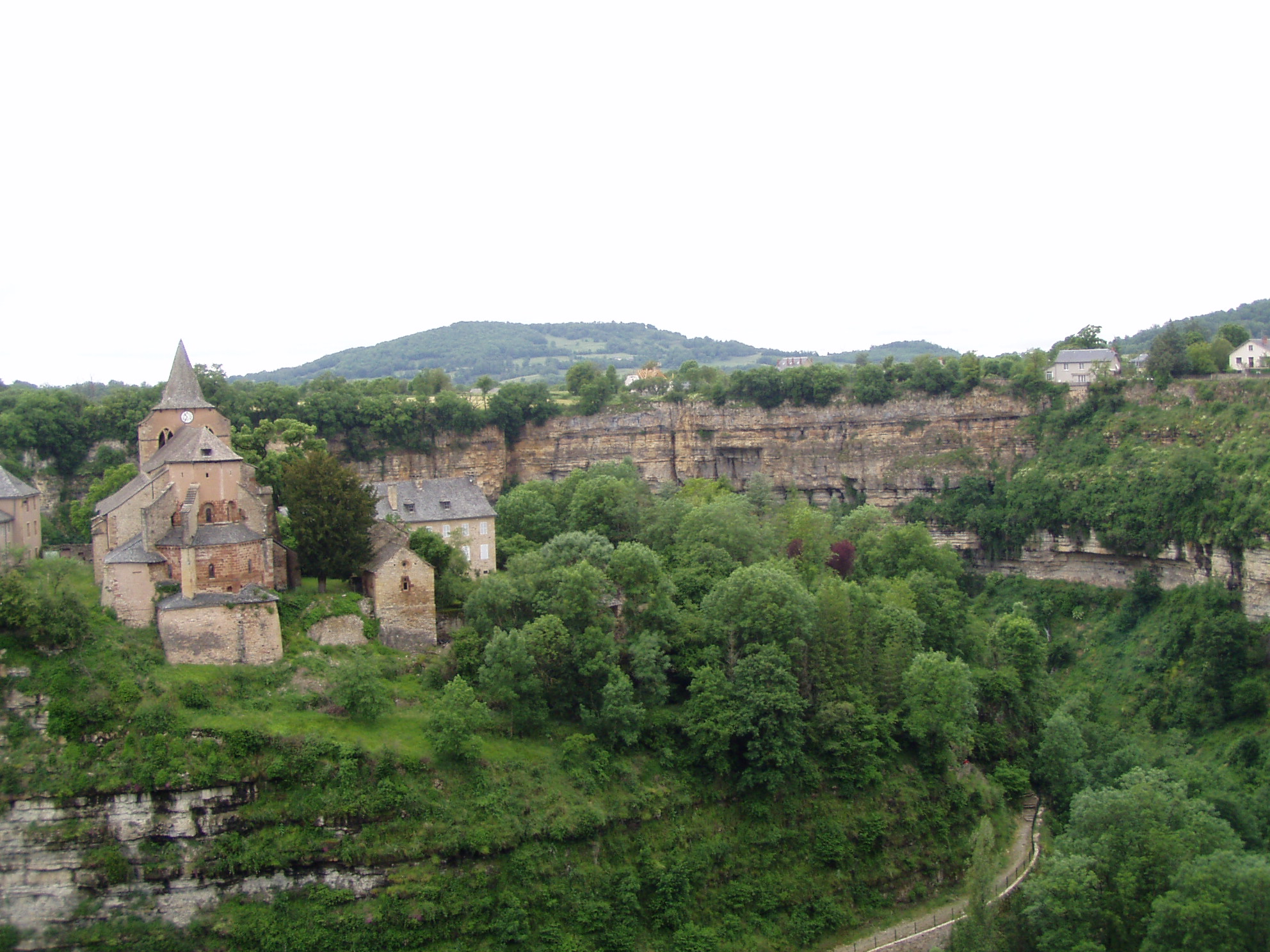 Le méandre du Dourdou formant le Trou de Bozouls et l'église Saint Fauste à Bozouls (Aveyron)